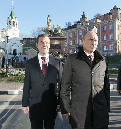 Дмитрий Медведев и Председатель Правительства Владимир Путин возложили цветы к памятнику Минину и Пожарскому по случаю празднования Дня народного единства.